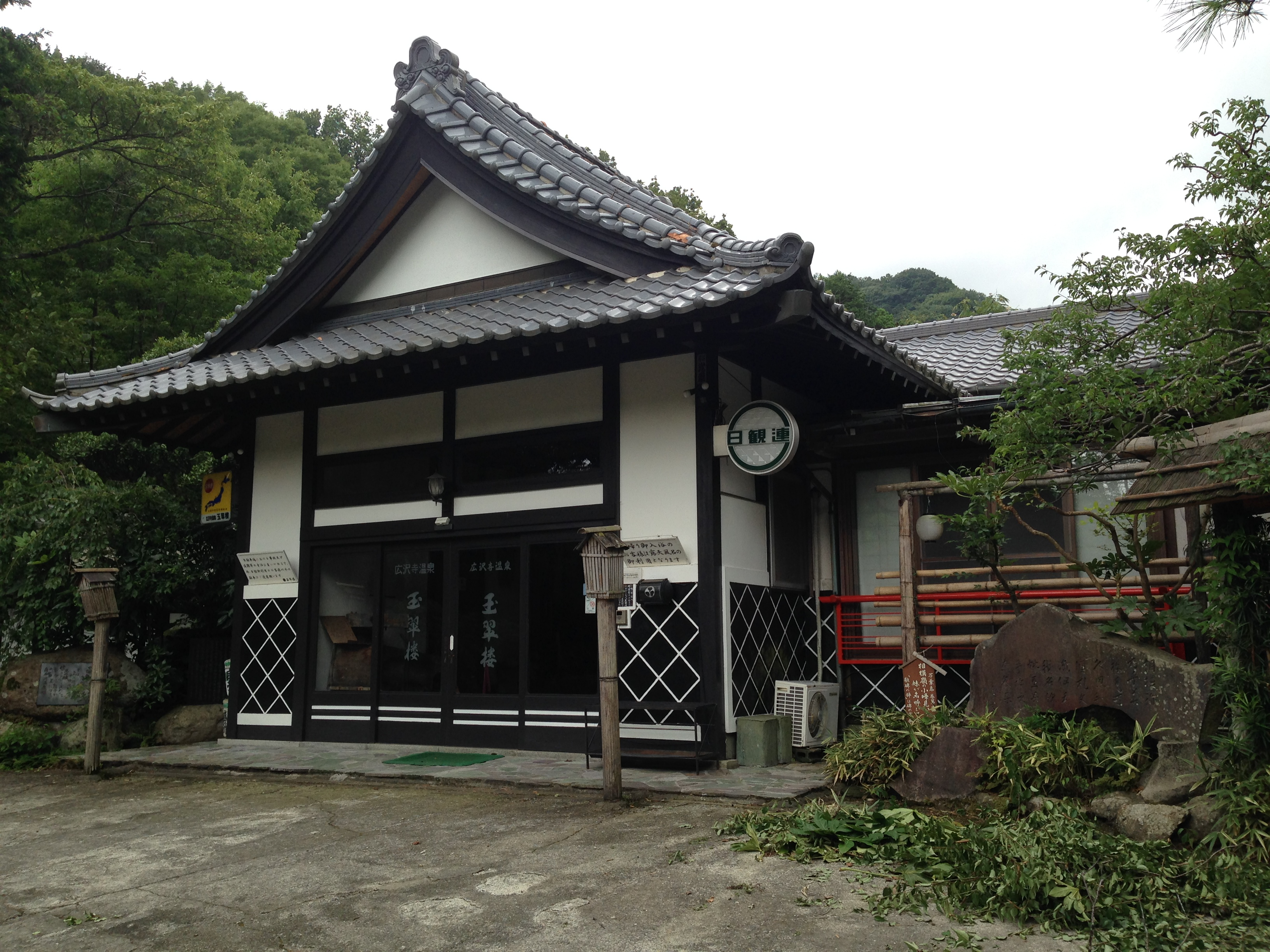 広沢寺温泉「玉翠楼」の外観。